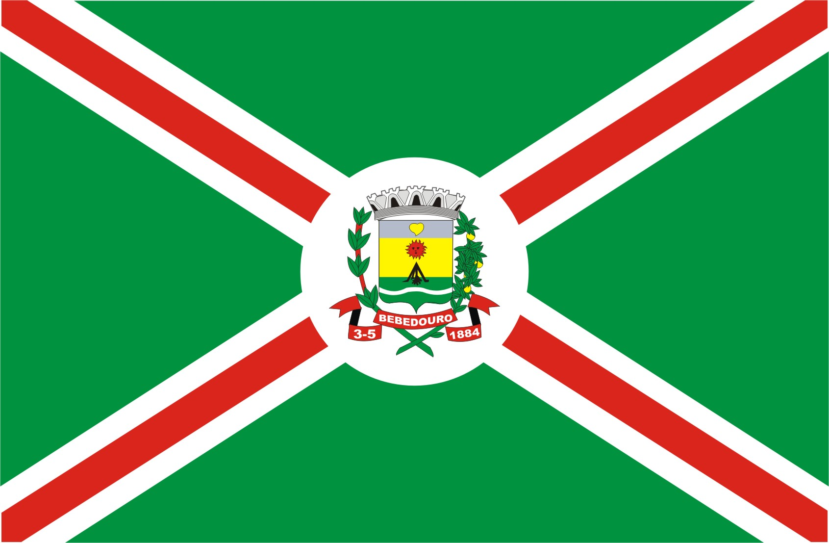 Bandeira da Cidade de Bebedouro/SP/Brazil